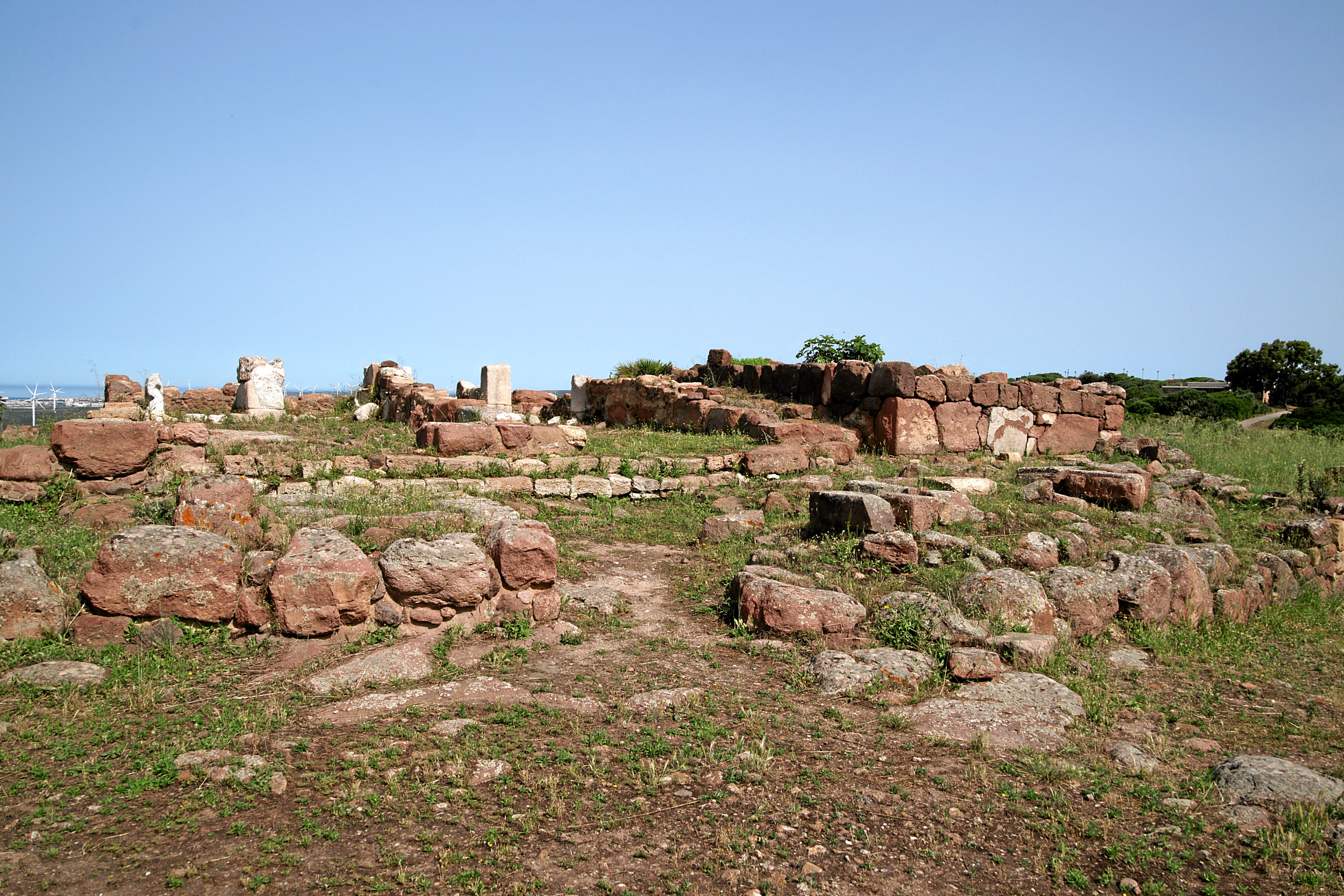 Parco archeologico Monte Sirai, Carbonia: Astarte - Tempel